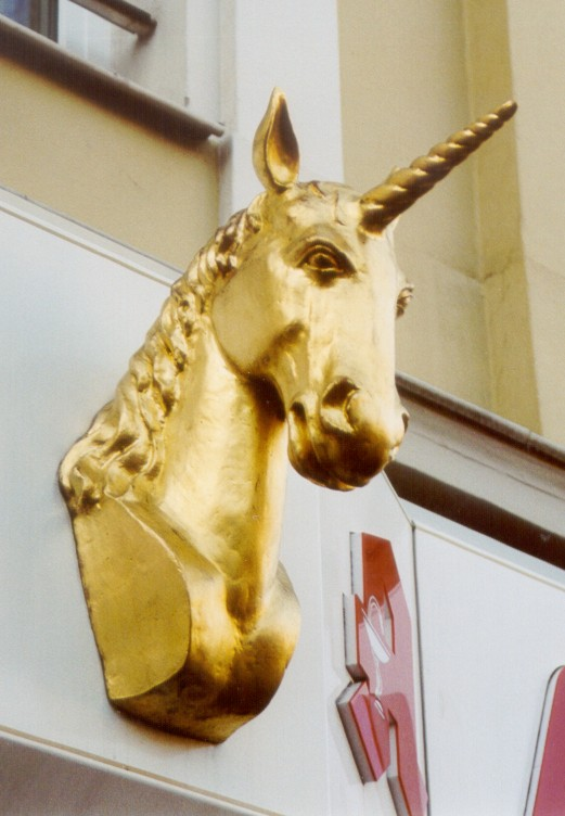 Kopf eines Einhorns über dem Eingang der Einhorn-Apotheke in Trier nahe der Porta Nigra. Fotografiert am 4. Mai 2003.